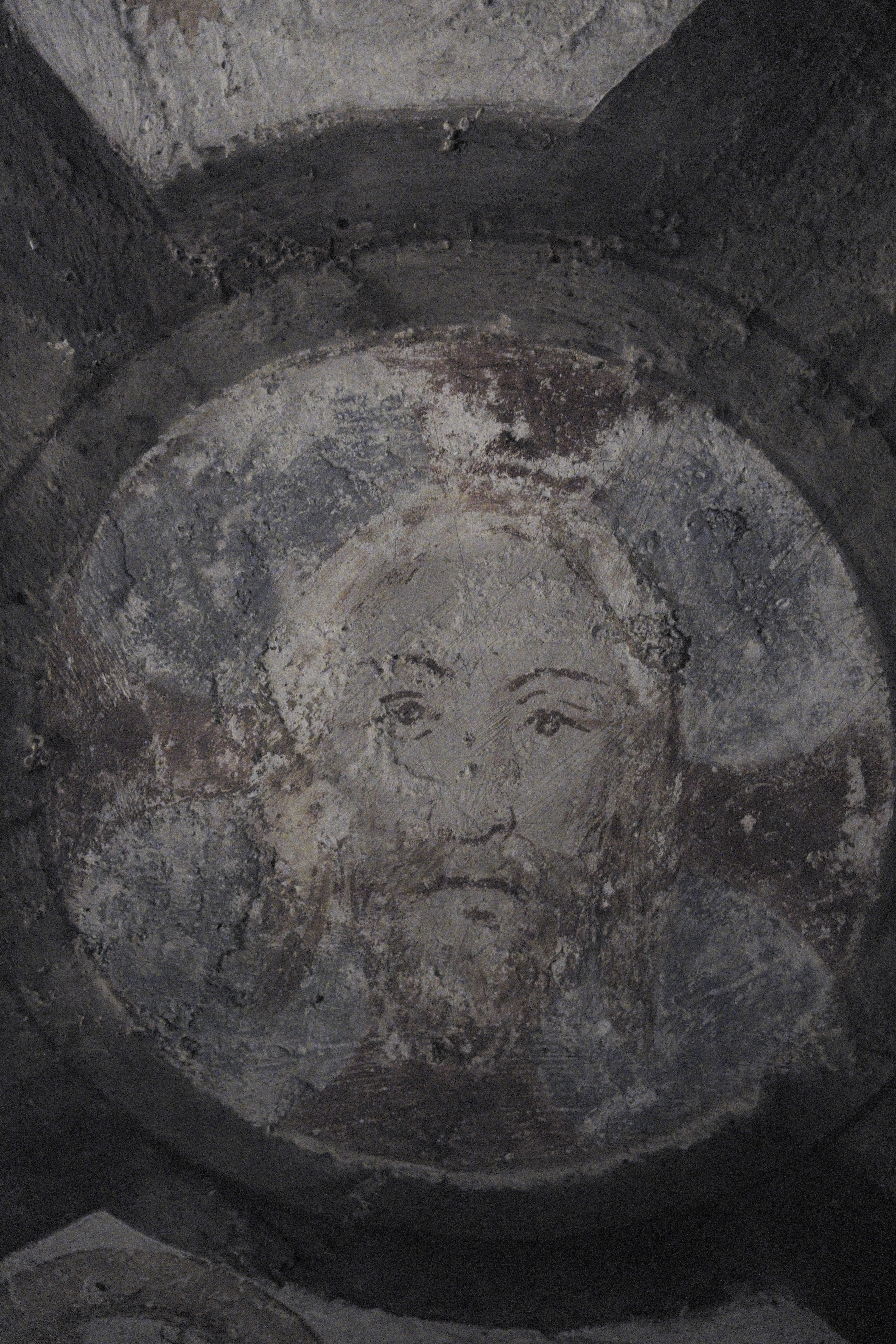 Katholische Kirche Saint-Pierre in Yzeure im Département Allier (Auvergne-Rhône-Alpes/Frankreich), Deckenmalerei aus dem 15. Jahrhundert in der Krypta; Darstellung: Christuskopf mit Kreuznimbus